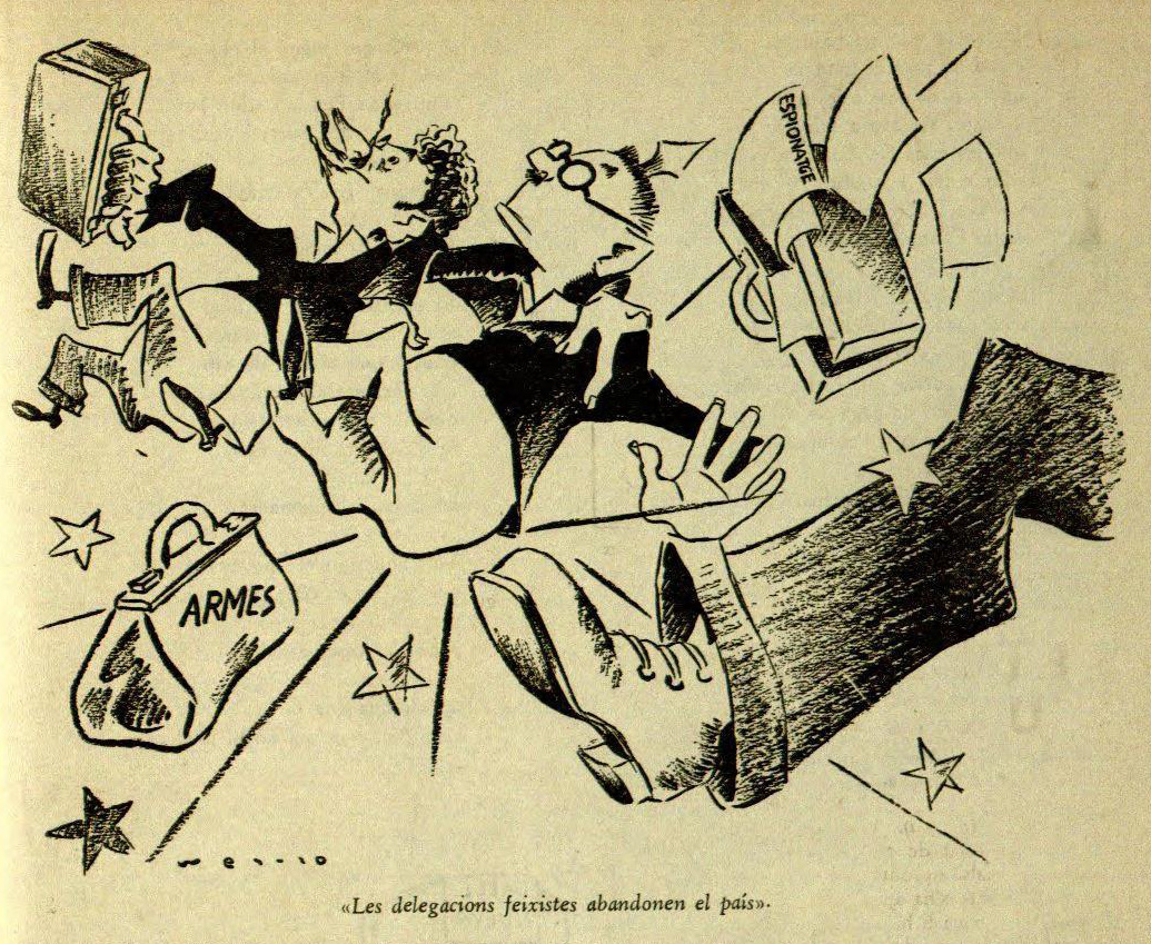 1445 imag papitu